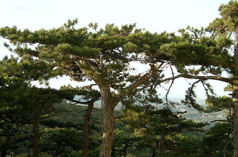 Schwarzkiefer (Pinus nigra) am Anniner in Niederösterreich